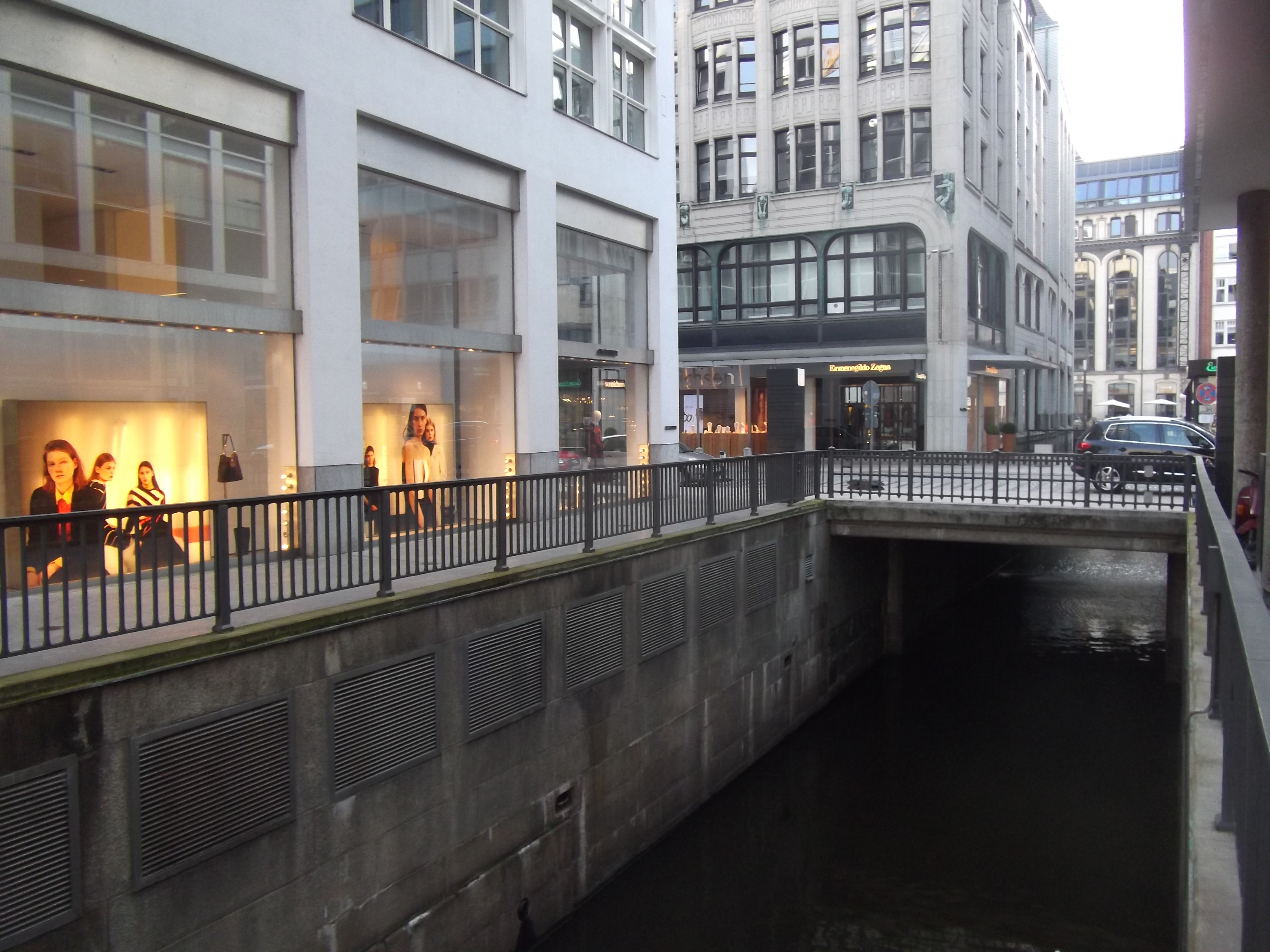 Hamburg, Neuer Wall